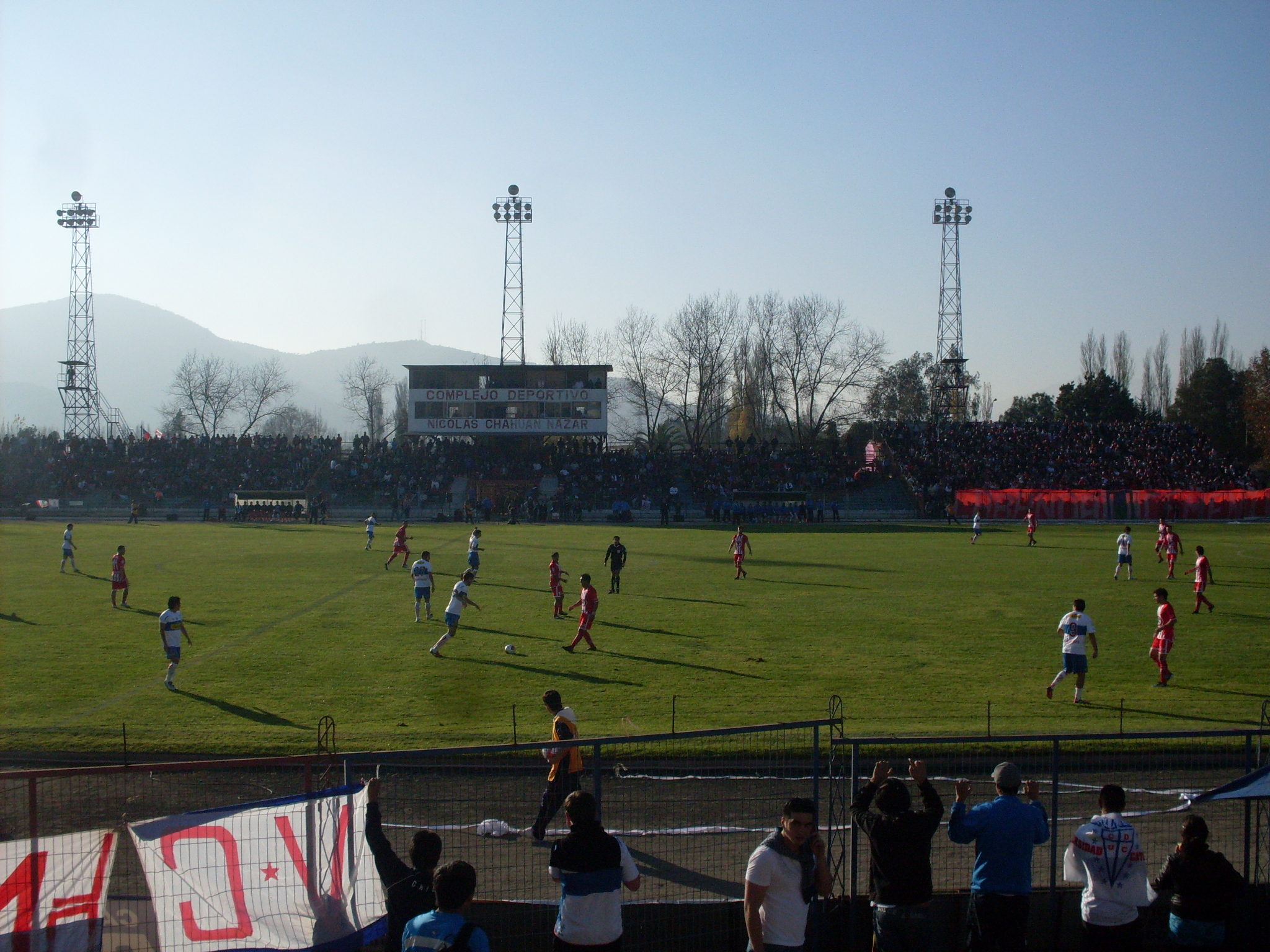 Estadio Nicolás Chahuán Nazar de La Calera durante el partido entre Unión La Calera y Universidad Católica en el Torneo Apertura 2011 de Chile